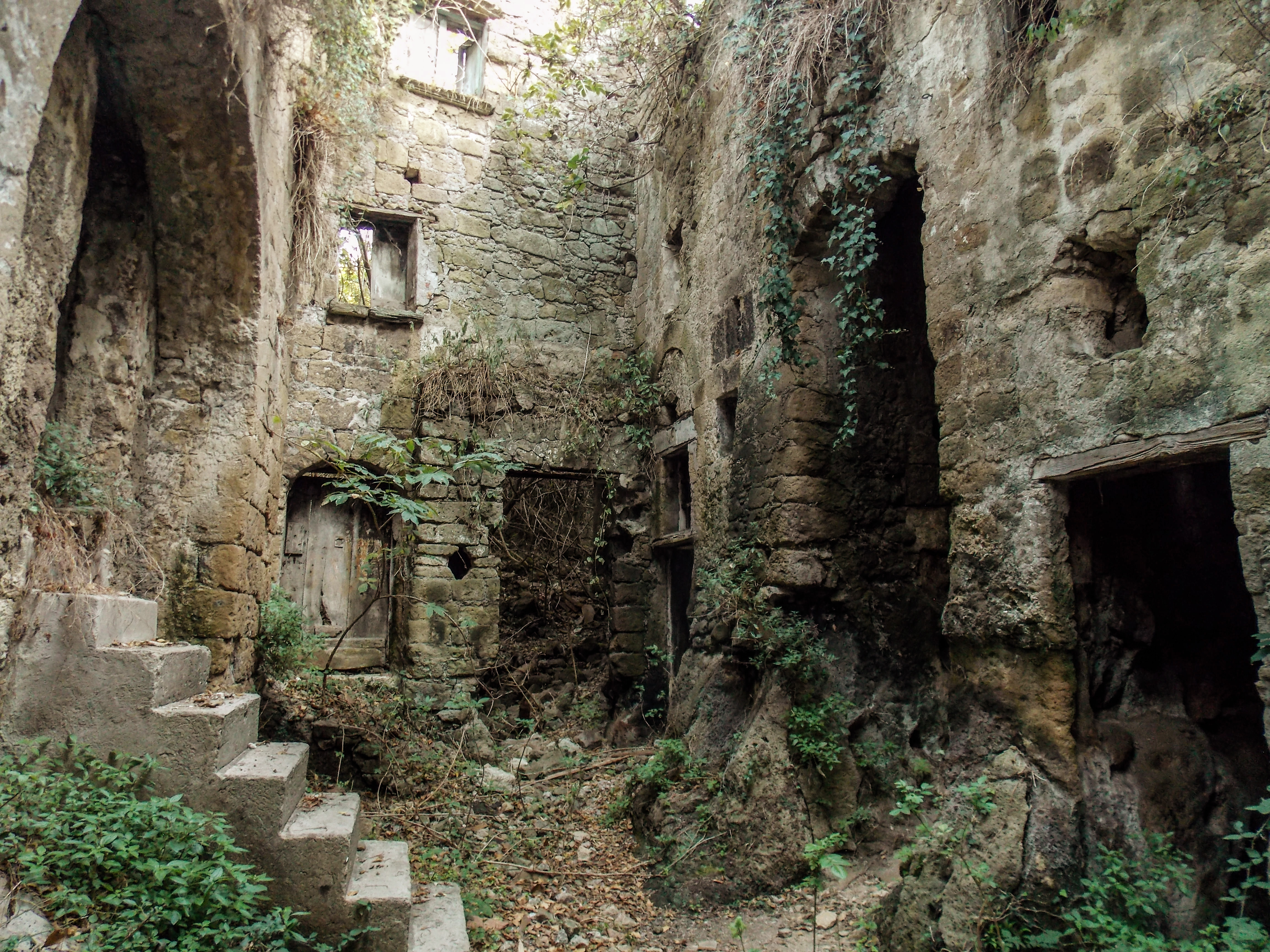 Il vecchio centro,ora abbandonato, di Tocco Caudio (BN)